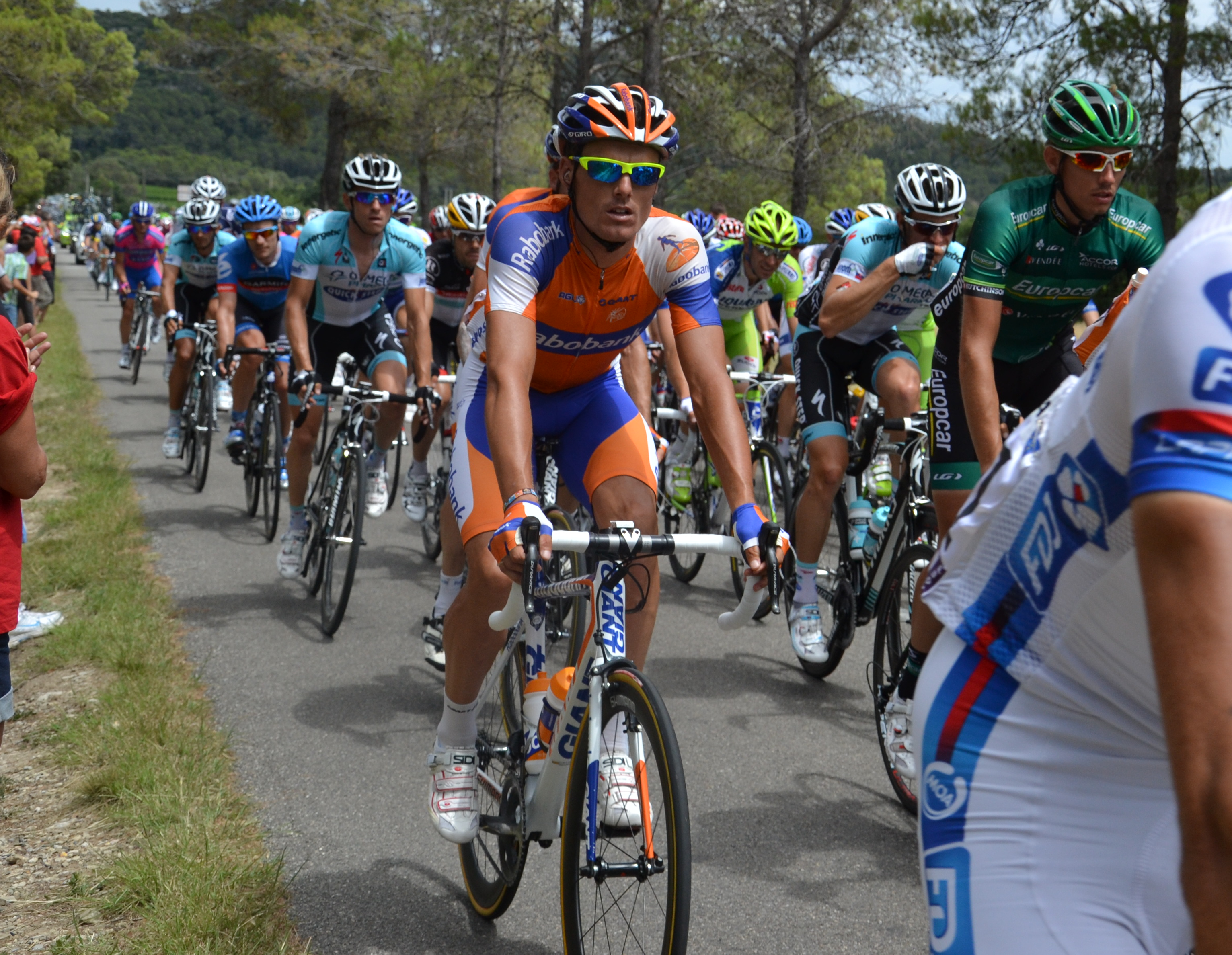 13e étape du Tour de France 2012. Passage du peloton au Pic St-Loup sur la D1 (km 120).